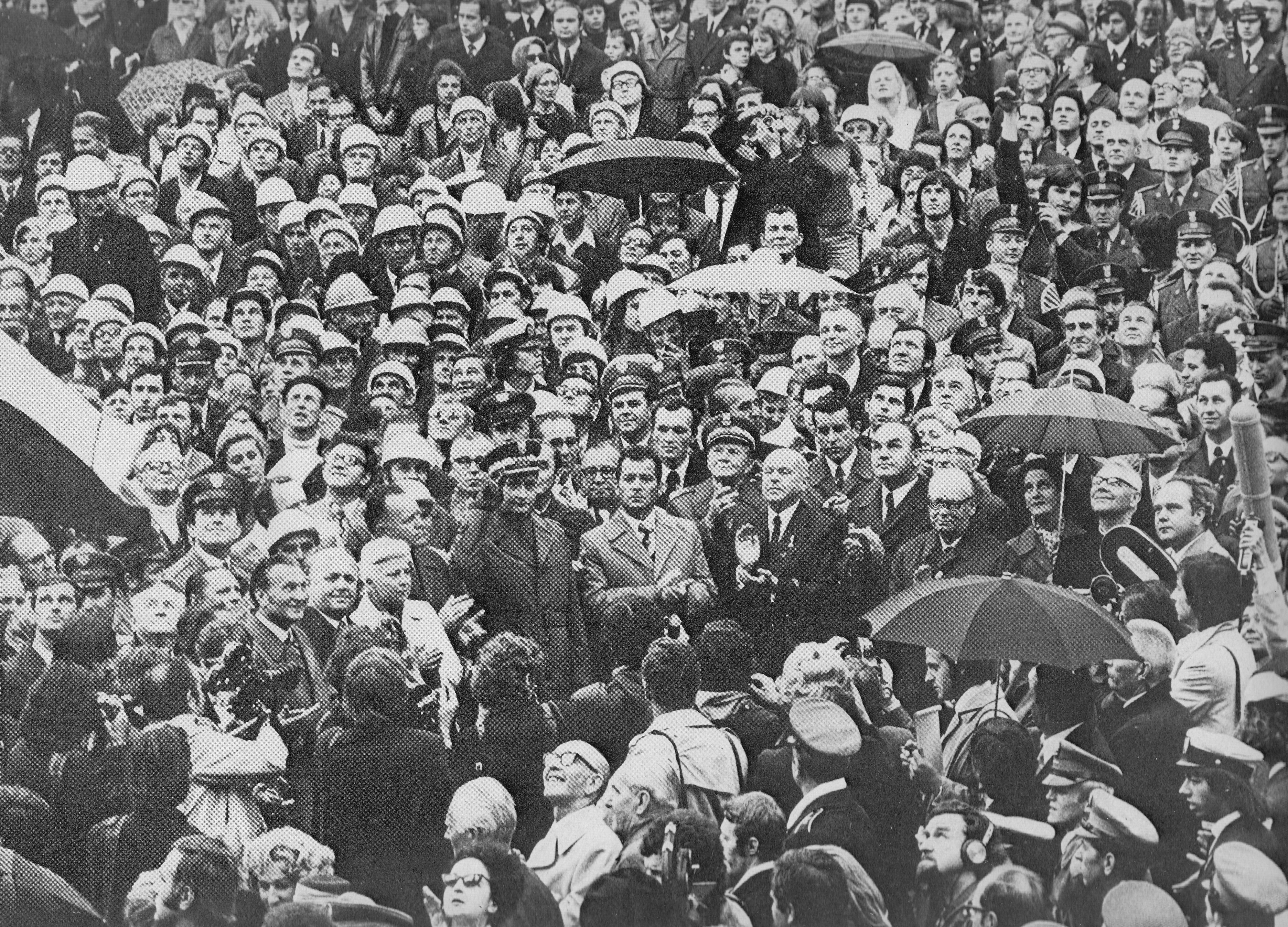 Zakończenie I etapu odbudowy Zamku Królewskiego 19 lipca 1974